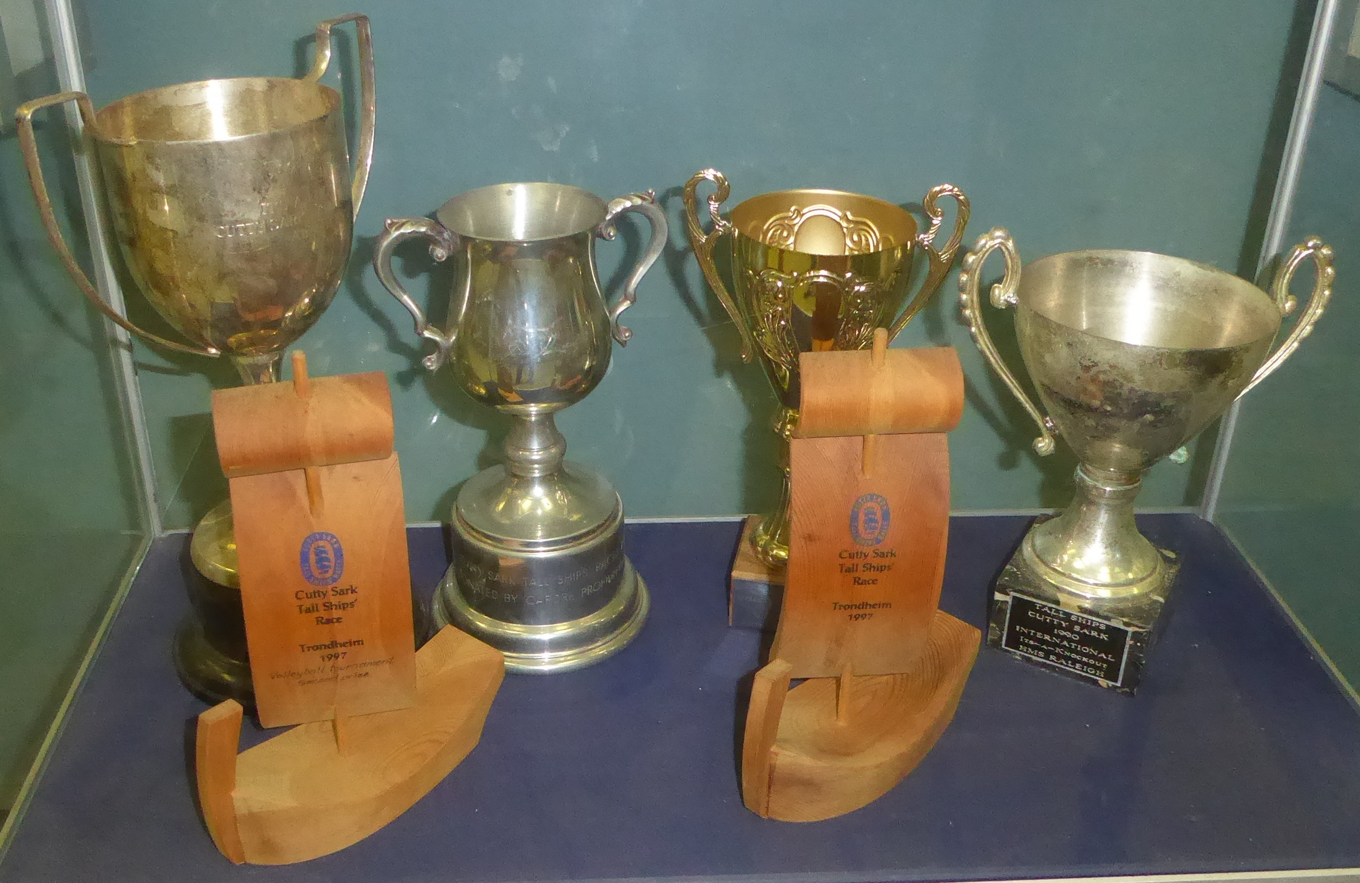 Marineakademie Warna-Cutty Sark, Tall Ships Race - Auszeichnungen